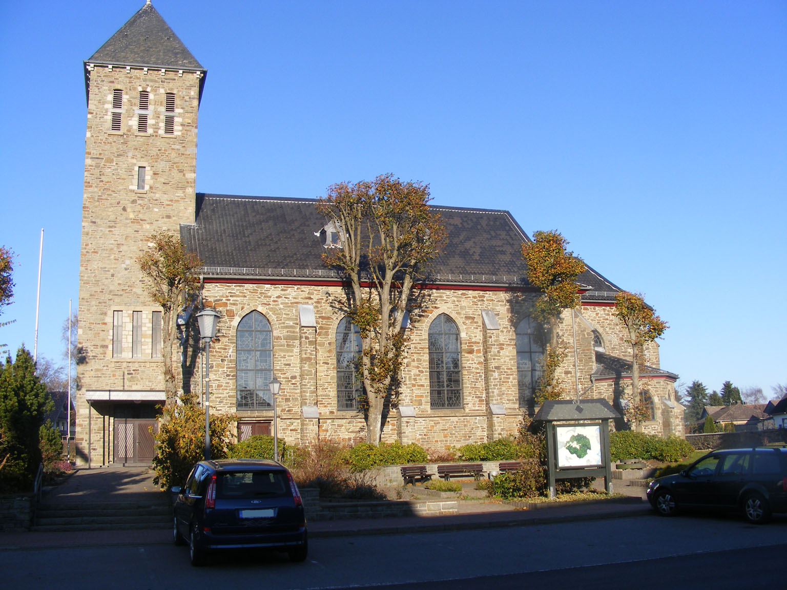 Kirche St. Peter und Paul, Kesternich